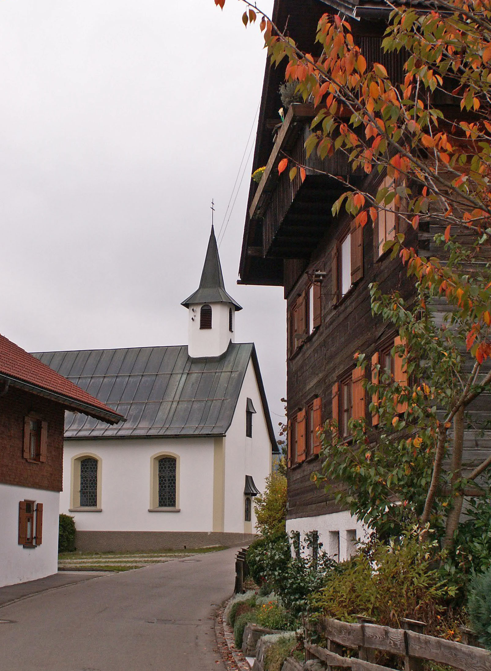 Kapelle in Hüttenberg, Ofterschwang